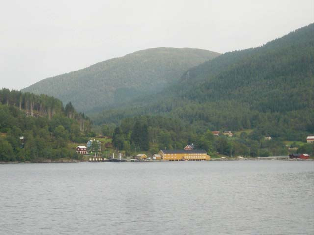 Aresvika in Norway